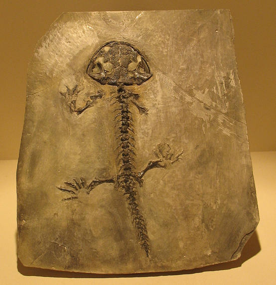 Karaurus, Il tesoro paleontologico della Russia